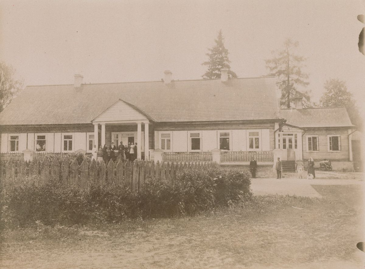 Беларуская (тарашкевіца): Мыслабаж (Mysłabaž), сядзіба Касакоўскіх (Kasakoŭski)